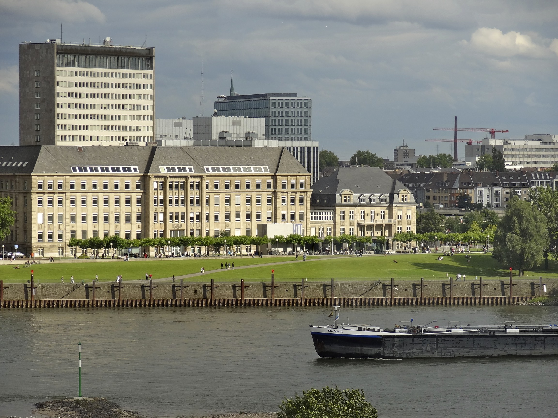 Landeshaus Düsseldorf, aus dem Riesenrad auf der Kirmes fotografiert.